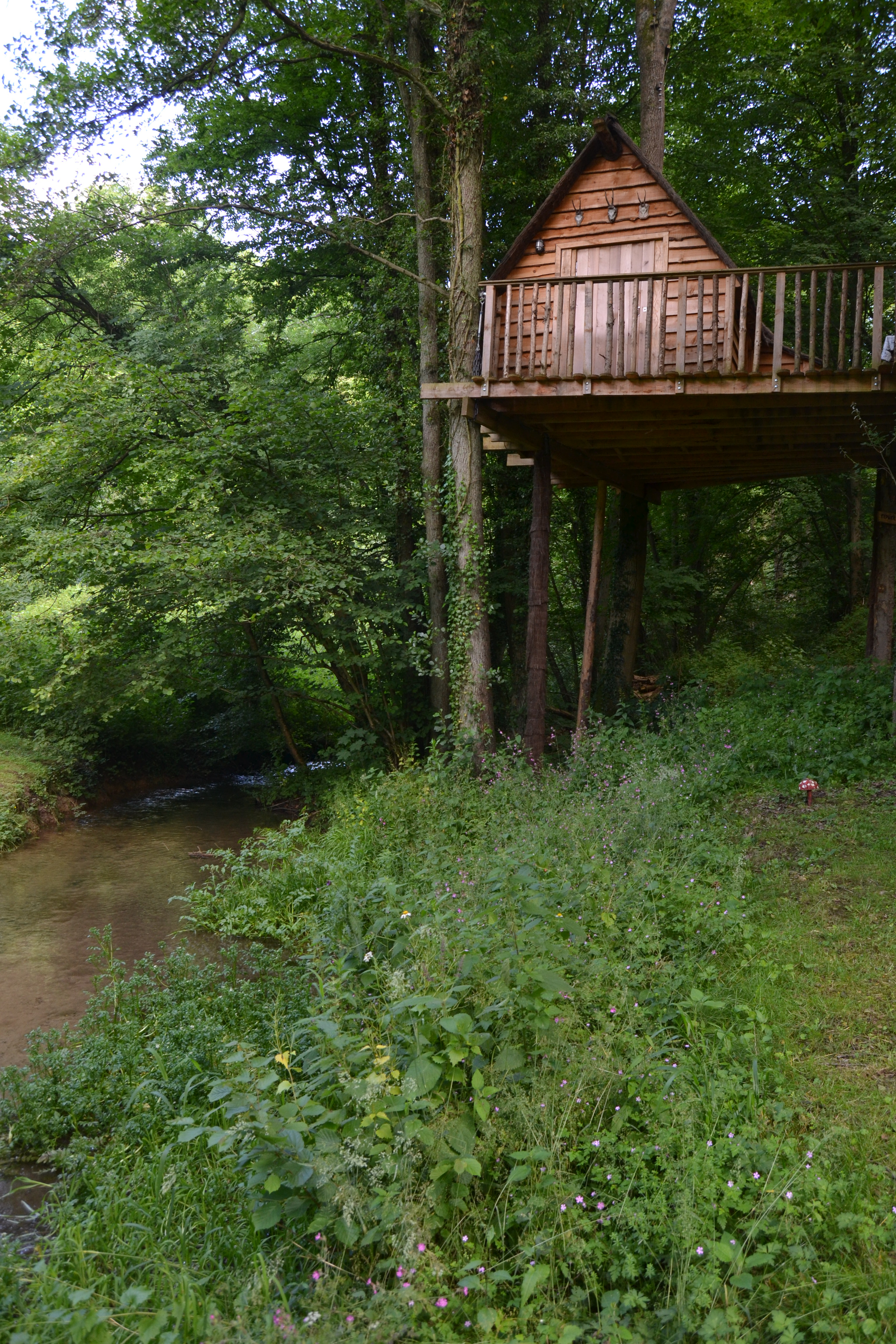 Moulin de Lisogne (Dinant)